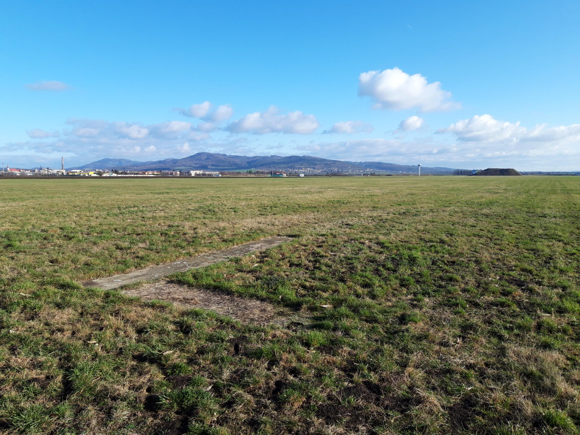 Letiště Holešov